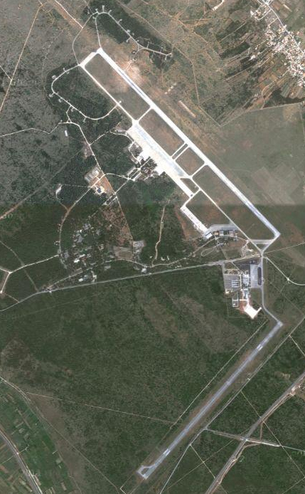 Satelitska snimka zračne luke zadar